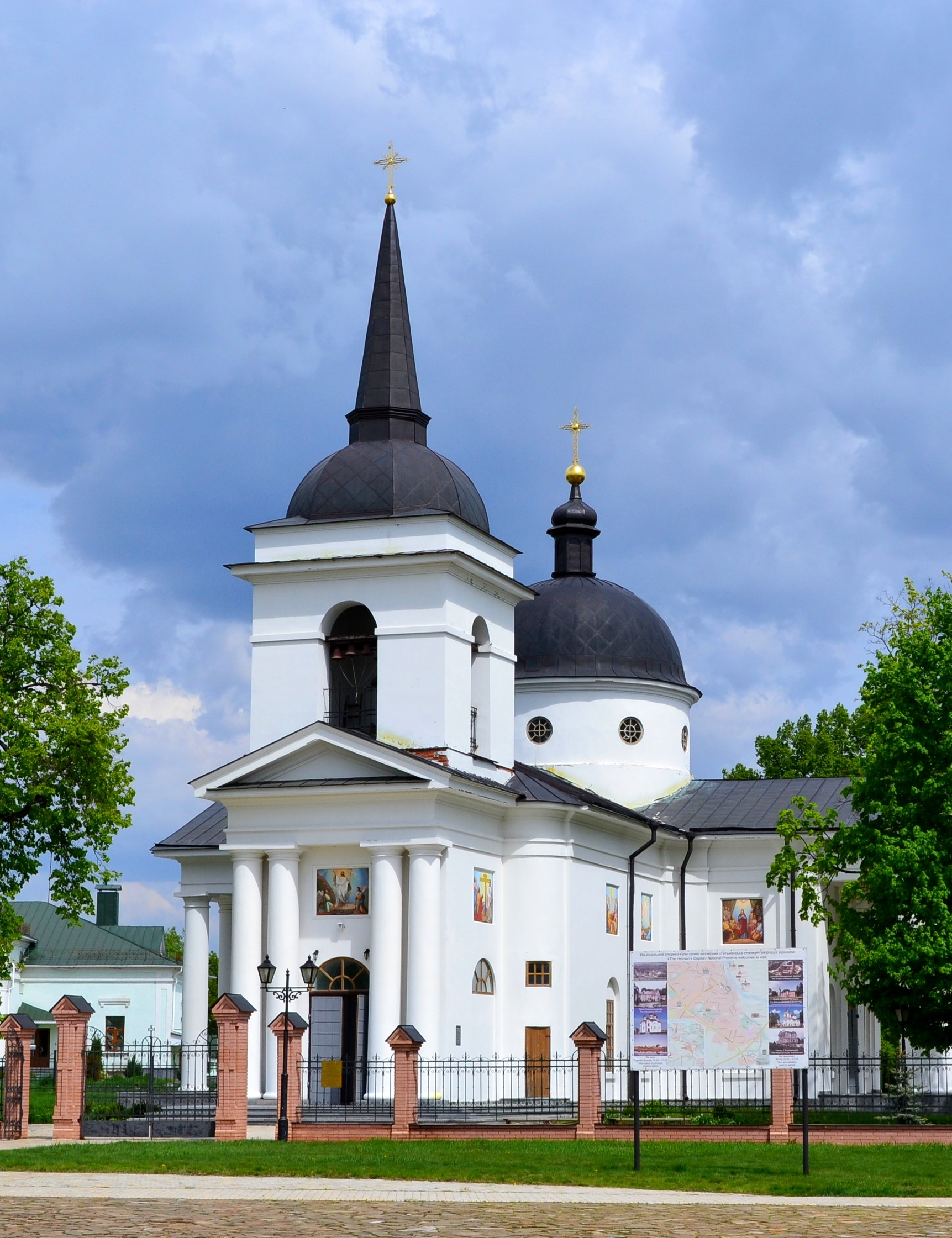 Фотографія Воскресенської церква усипальниці К Розумовського в Батурині